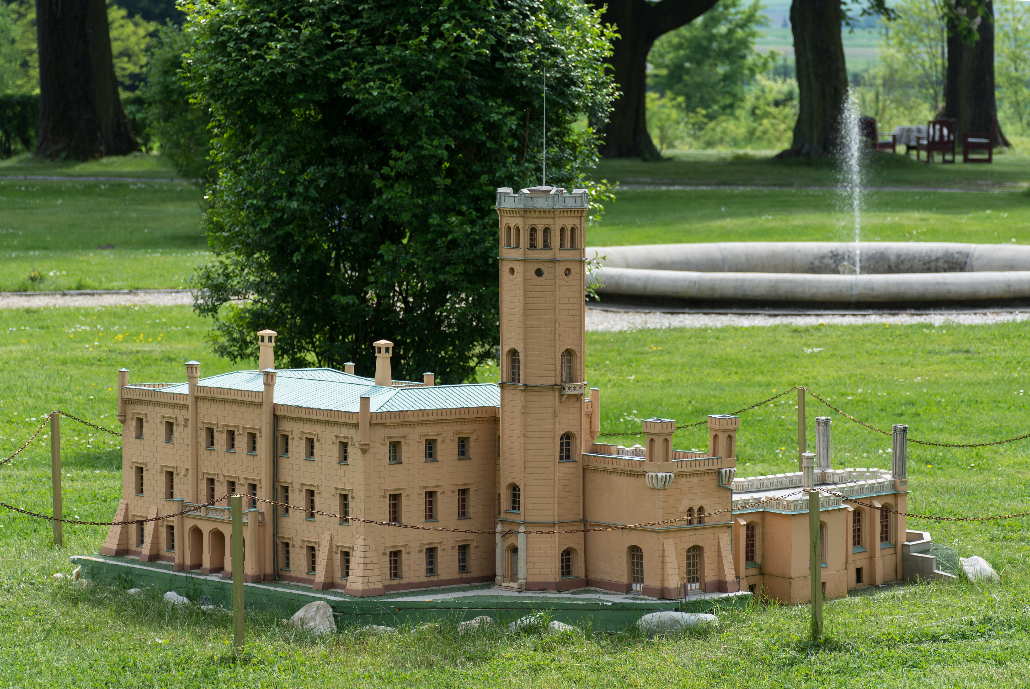 Żelazno, park przy pałacu, 2 poł. XVIII, XIX/XX w., miniatura pałacu w Mysłakowicach